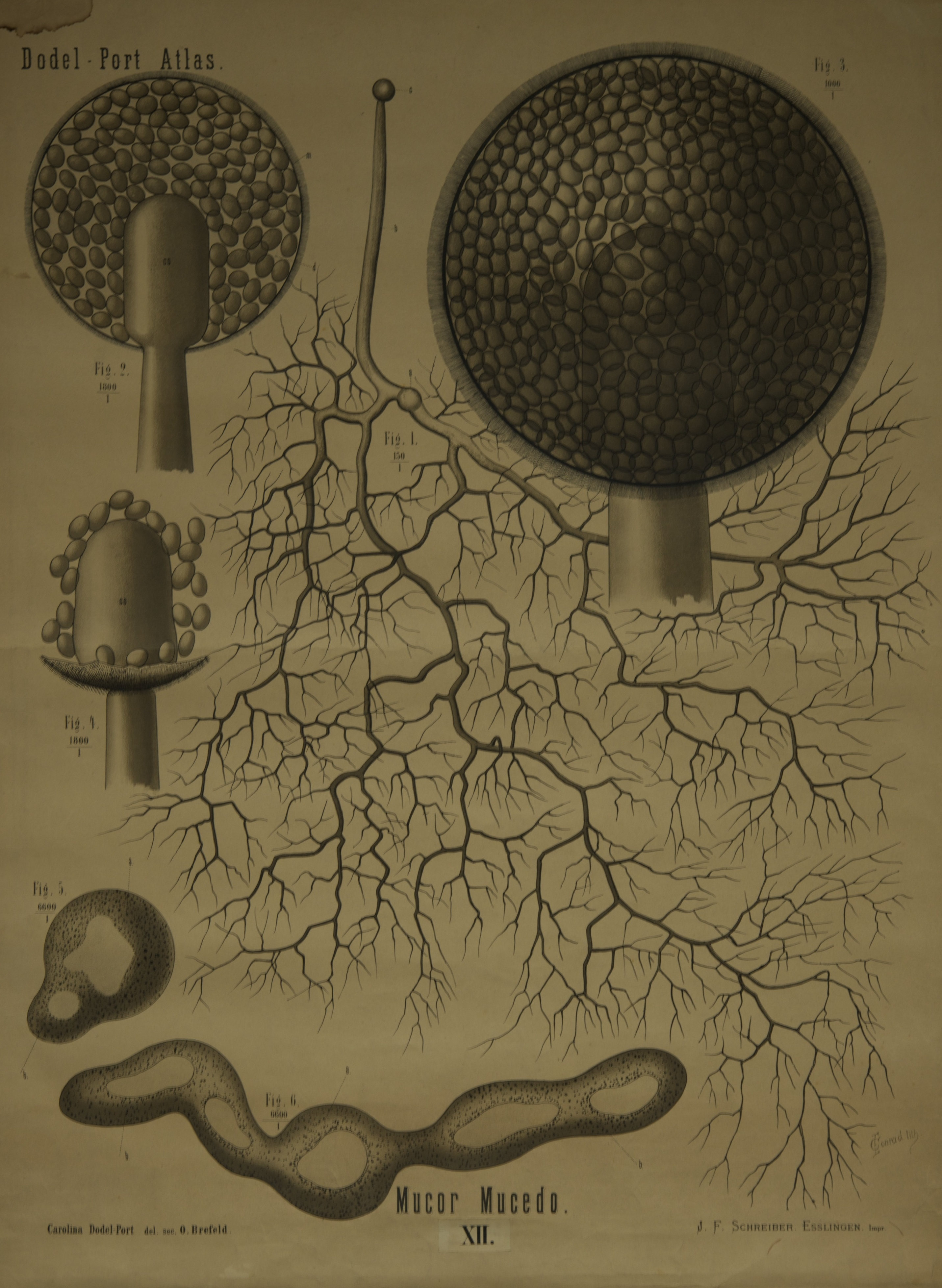 Planche d'illustration de l'Atlas de Botanique d'Arnold Dodel-Port de l'espèce Mucor mucedo